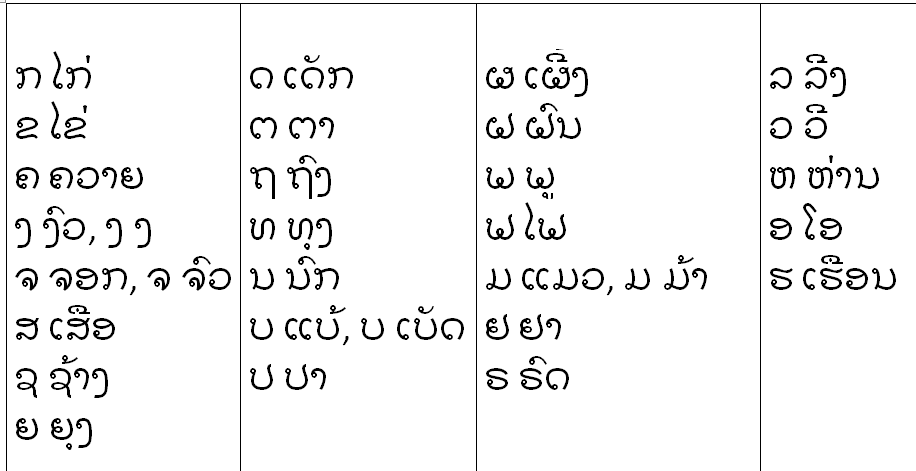 Аксонлао